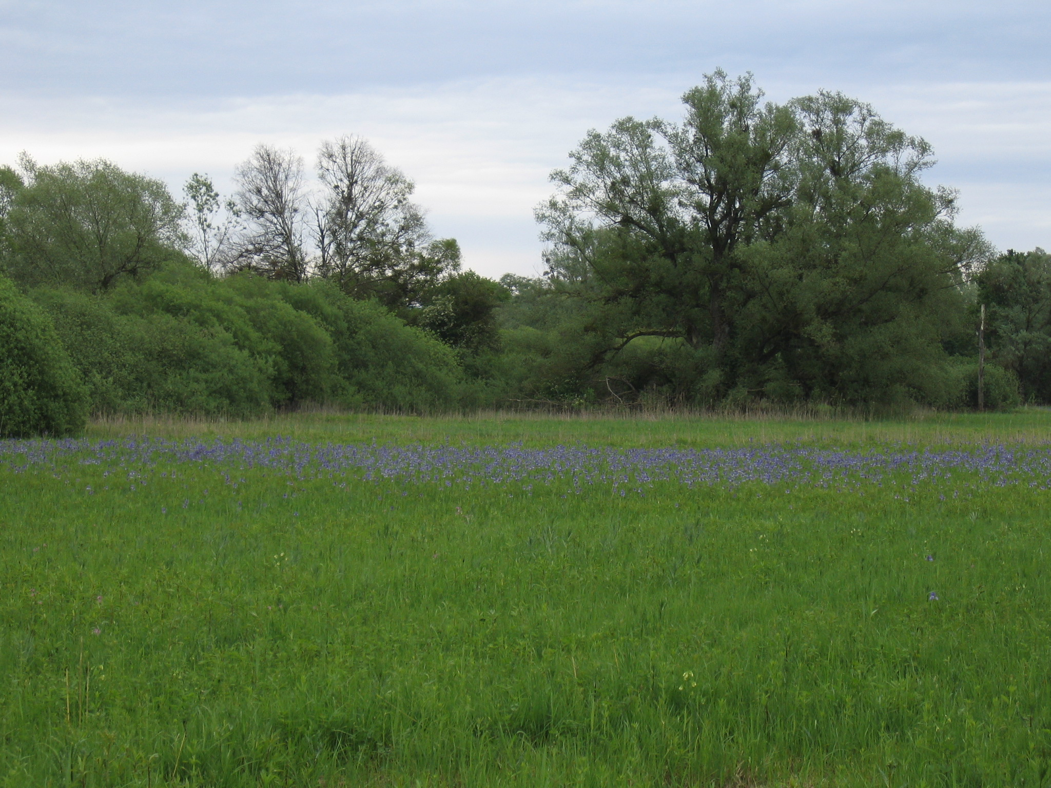 Sibirische Schwertlilie (Iris sibirica) in den Streuwiesen im "Eriskircher Ried" (als Naturschutzgebiet ausgewiesen seit 1939) in Eriskirch.